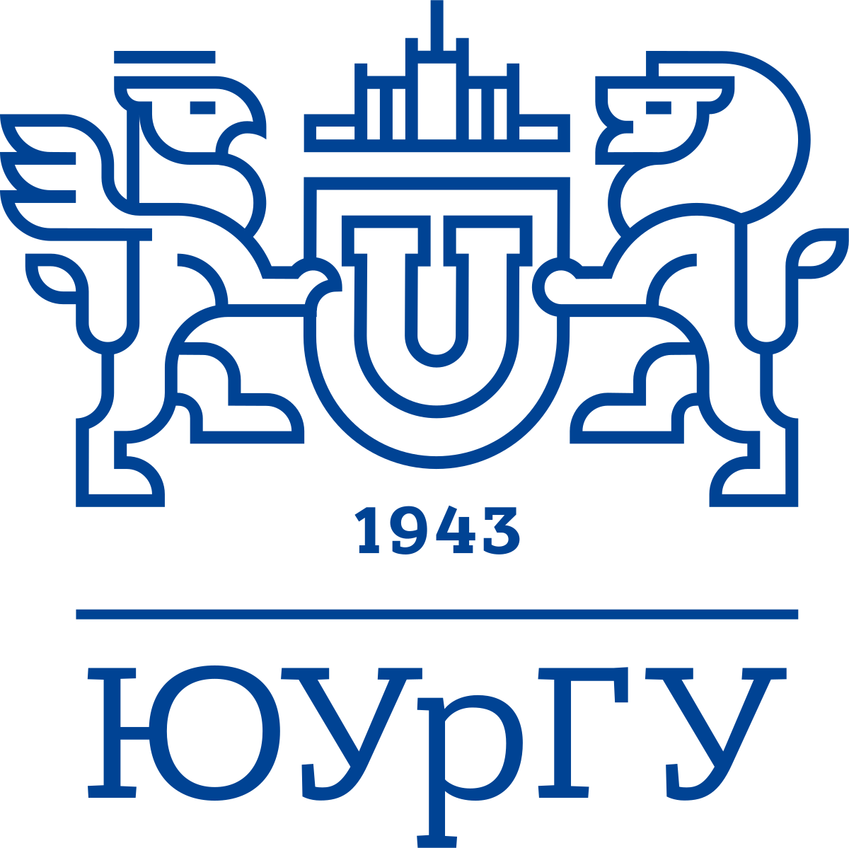 Logotype of South Ural State University